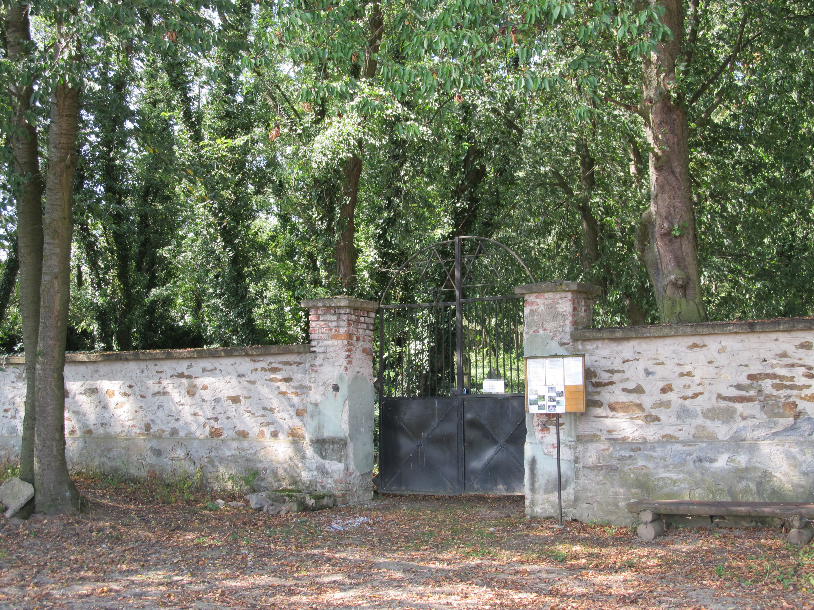 Poběžovice 01 ŽH